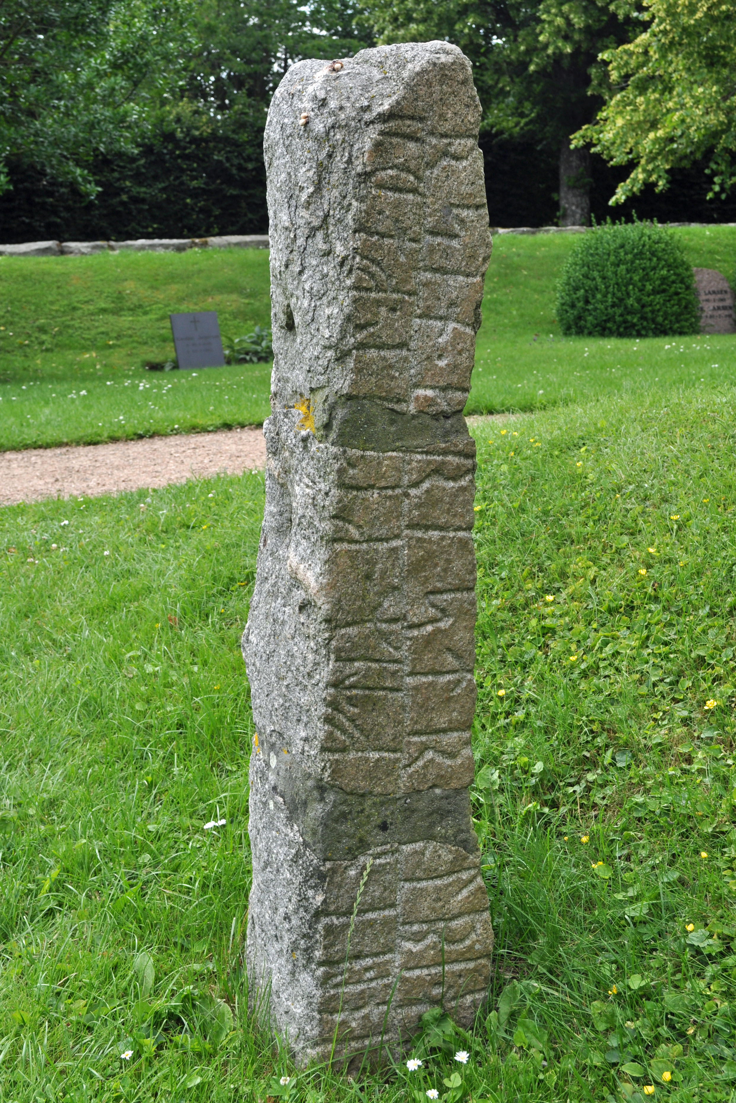 Østermarie Kirche, Bornholm (2012-07-11), by Klugschnacker in Wikipedia (15)